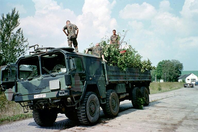 MAN 10to.gl der 5./Panzergrenadierbataillon 391 aus Bad Salzungen beim Elbehochwasser 2002